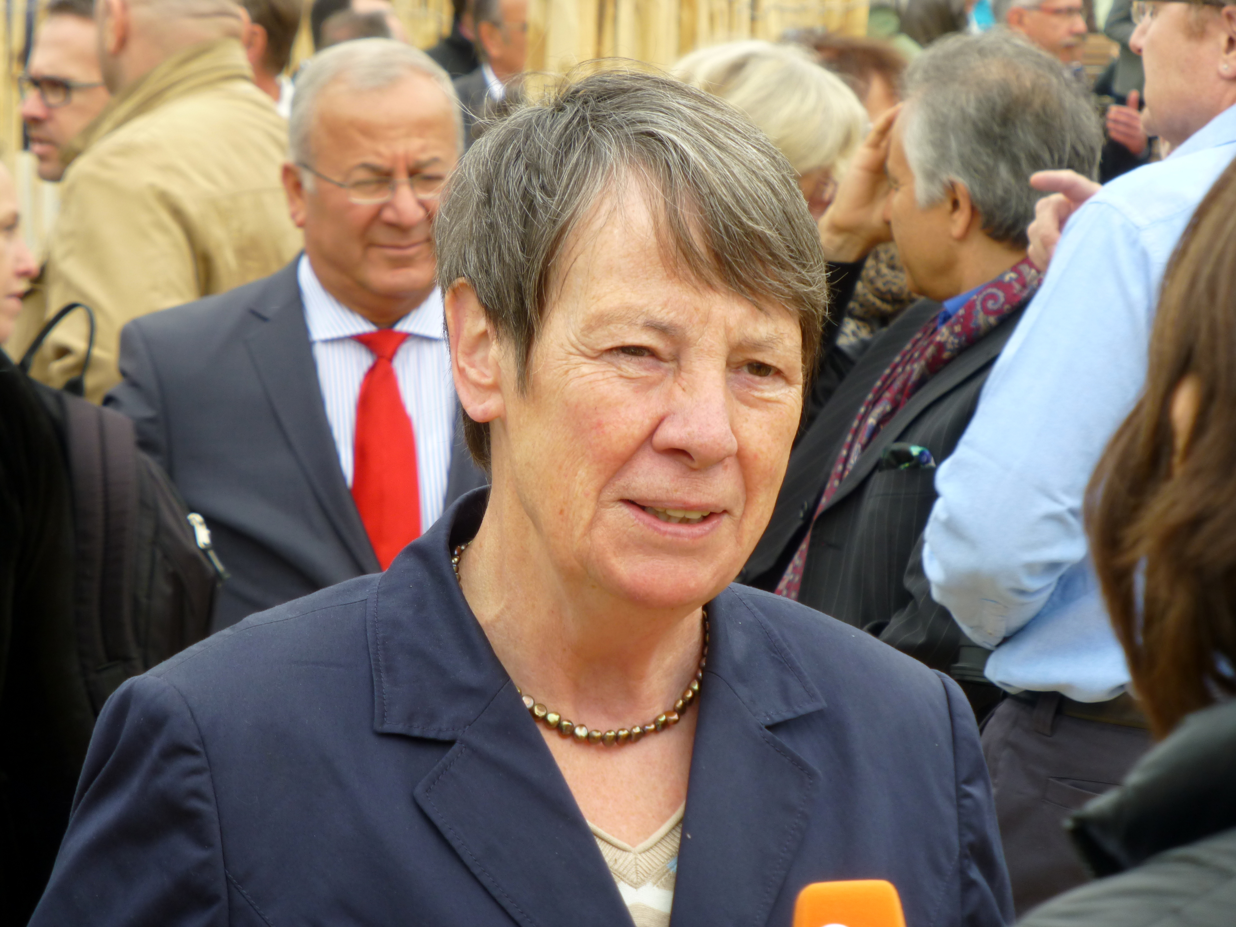 Veranstaltung zur Eröffnung des Nationalparks Hunsrück-Hochwald: Barbara Hendricks